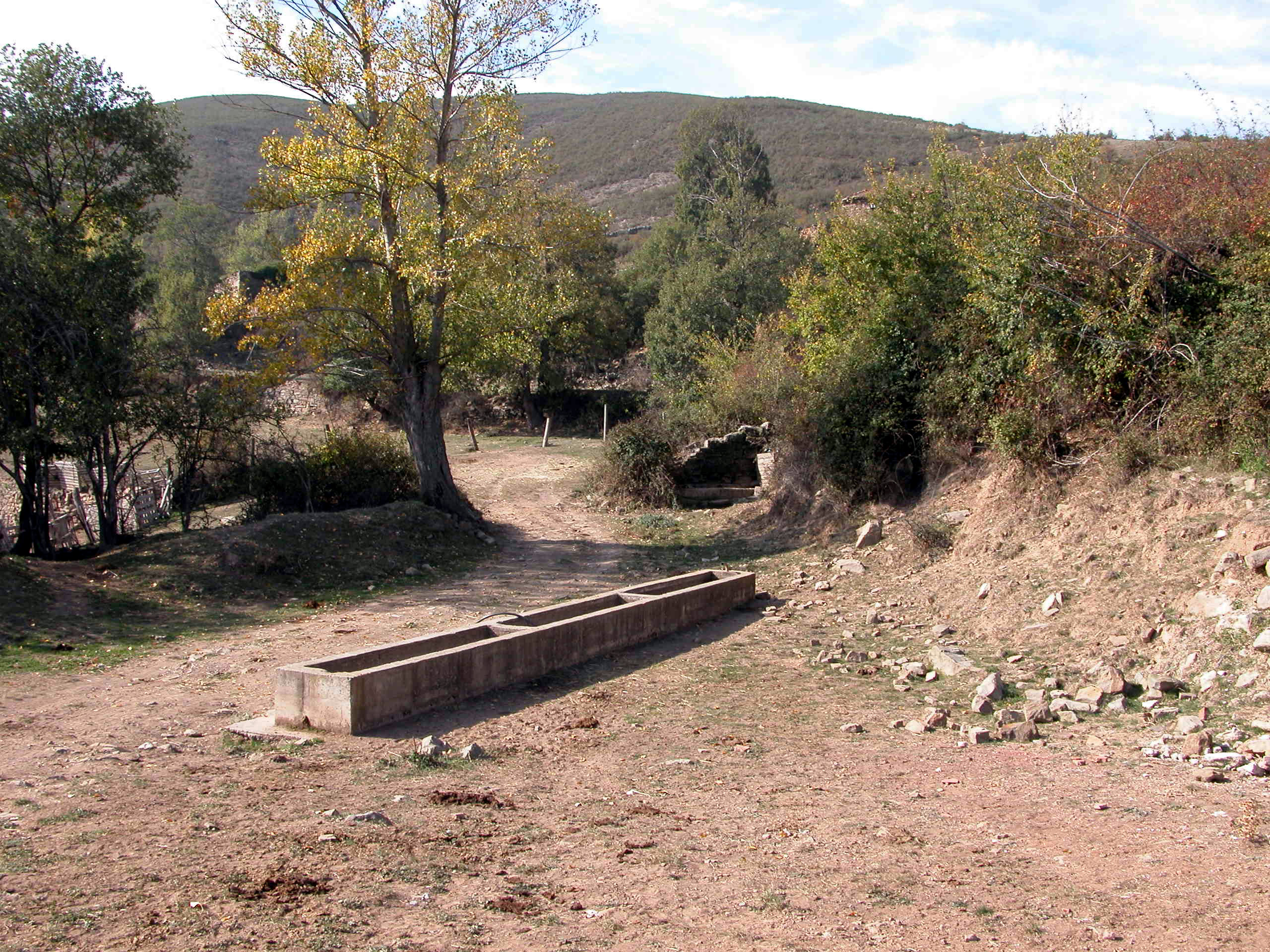 Dehesillas, despoblado de Robres del Castillo (La Rioja, España)